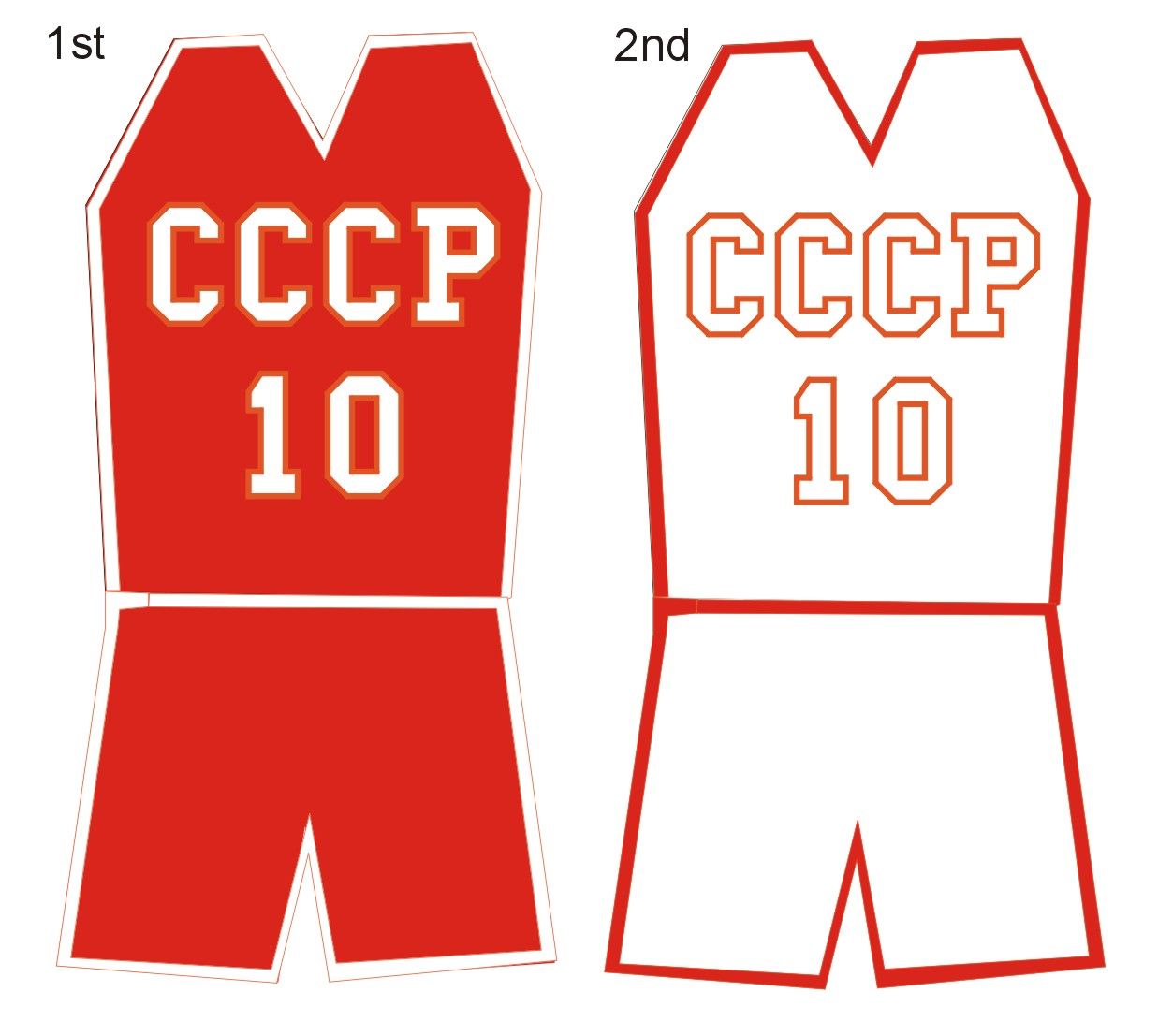 Uniforme de la selección de baloncesto de la URSS Dibujo realizado po SergiL